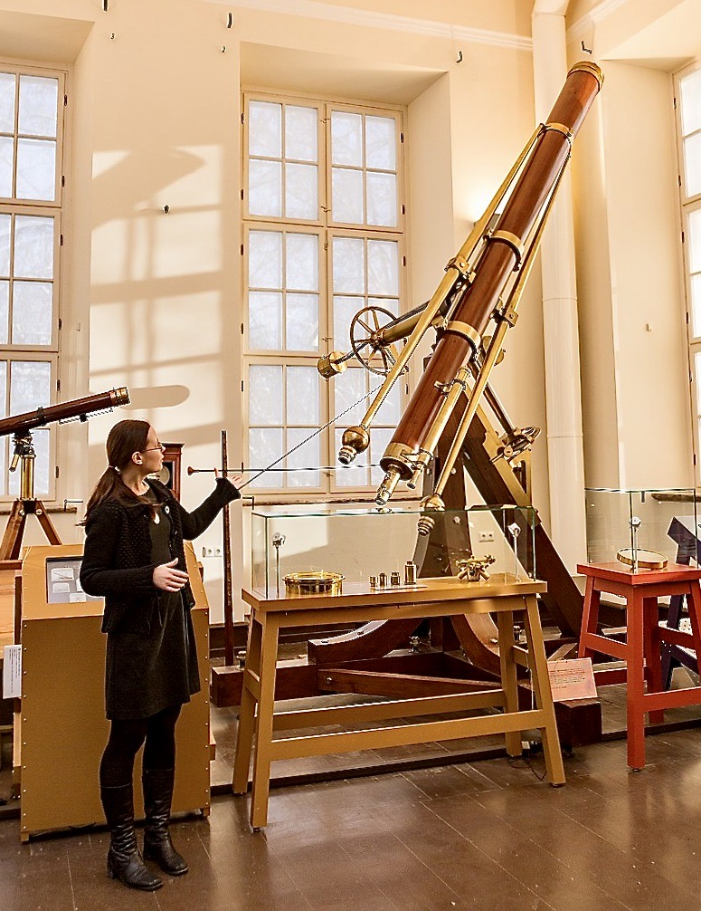 Joseph von Fraunhofer (1787–1826): Teleskop (Refraktor) für das Observatorium der Universität Dorpat (heute Tartu, Estland) mit einem achromatischen Objektiv von 9 Pariser Fuß (24,4 cm) Öffnung, 1824.